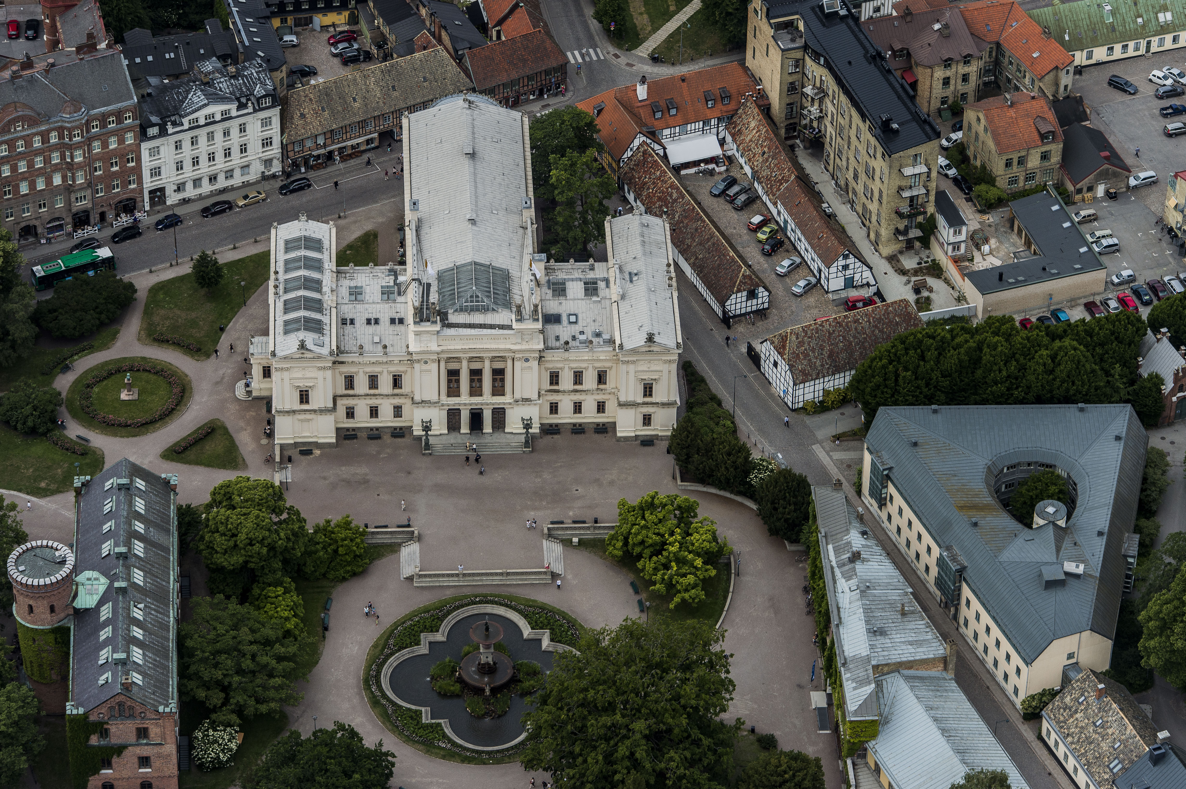 Lunds universitet